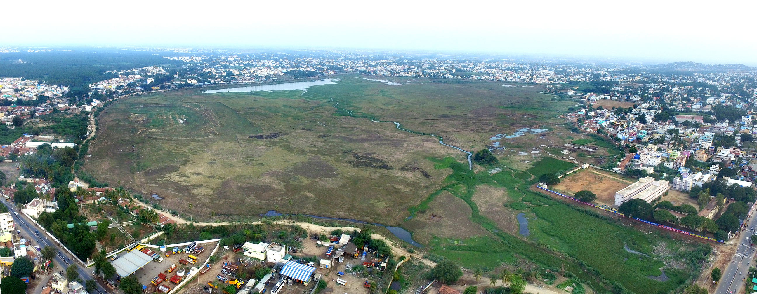 பறவை பார்வையில் வற்றி வறண்டு போன குறிச்சி குளம்